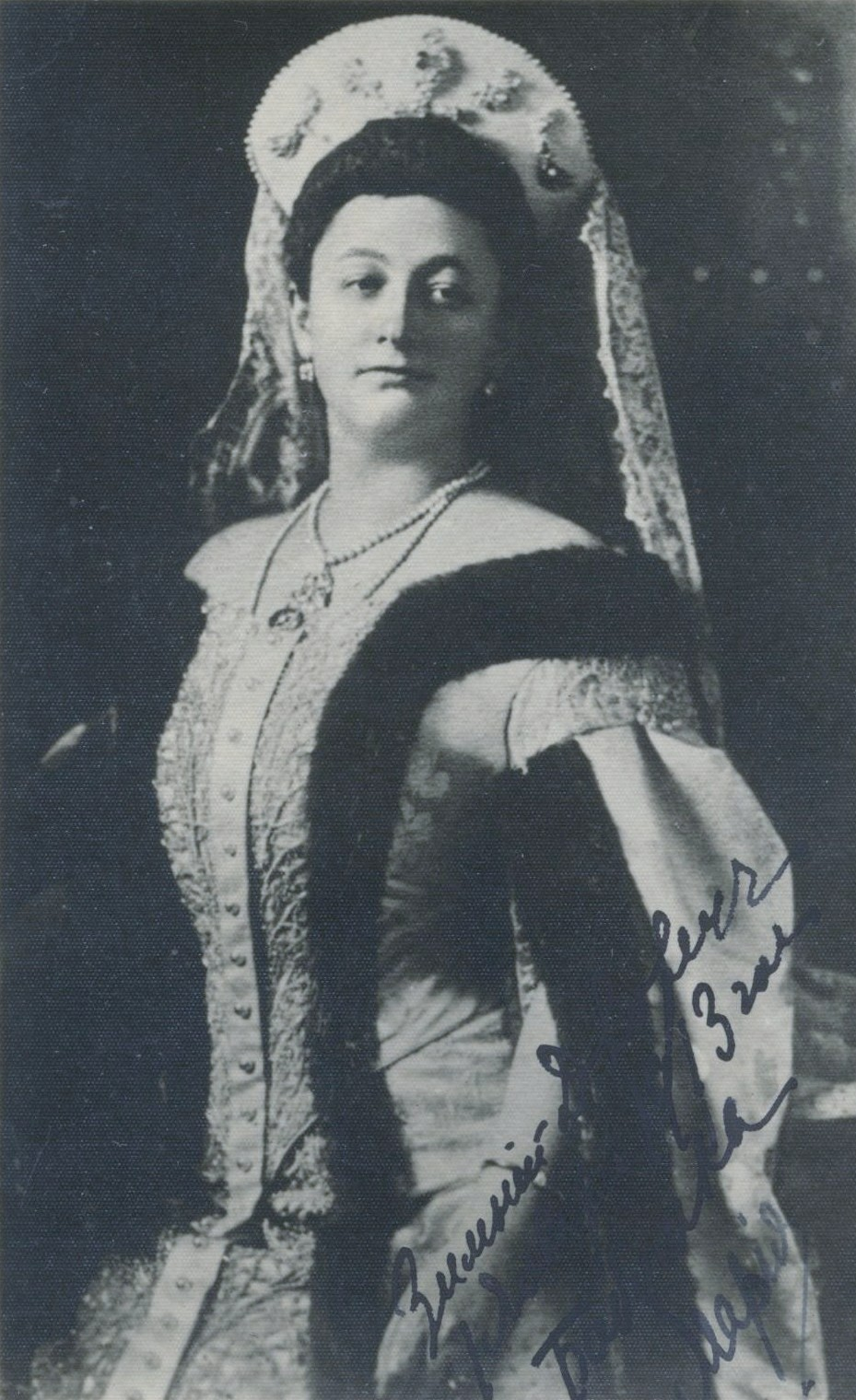 Княгиня Мария Александровна Святополк-Мирская, ур. Бельгард (29.12.1878—25.01.1920)